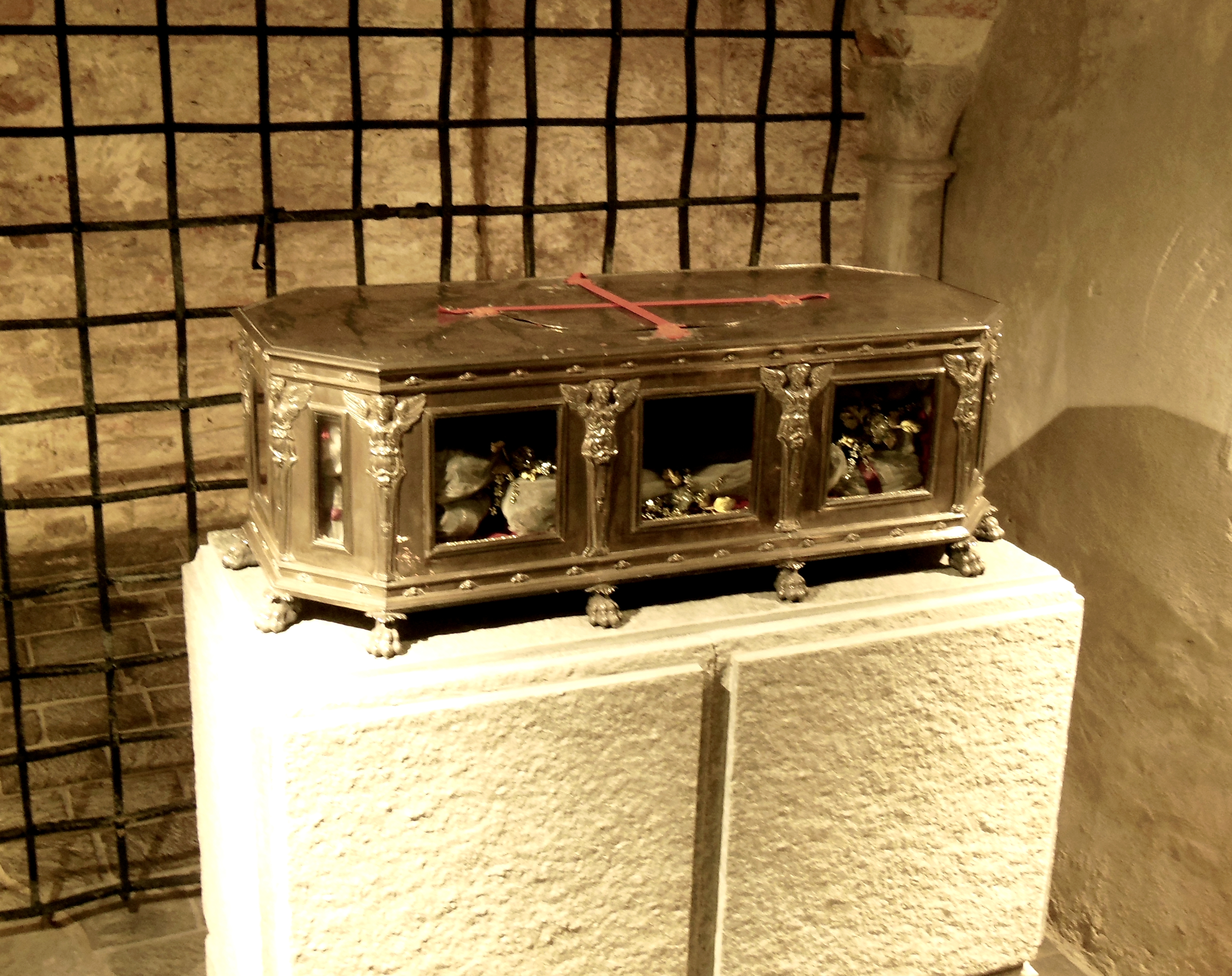 Collegiata di San Secondo This is a photo of a monument which is part of cultural heritage of Italy.